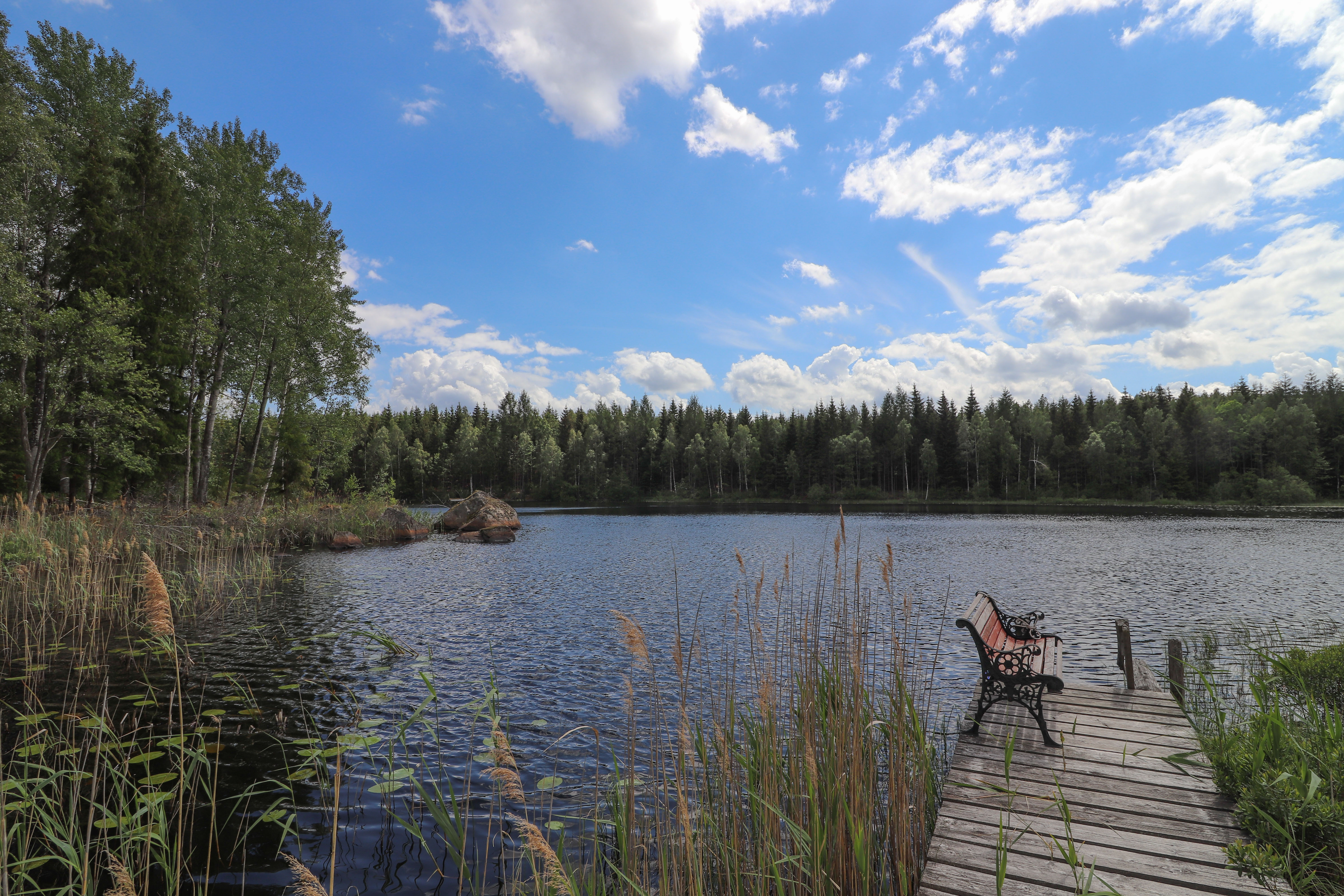 Hundsgölen i Oskars socken,Nybro kommun i juni månad.